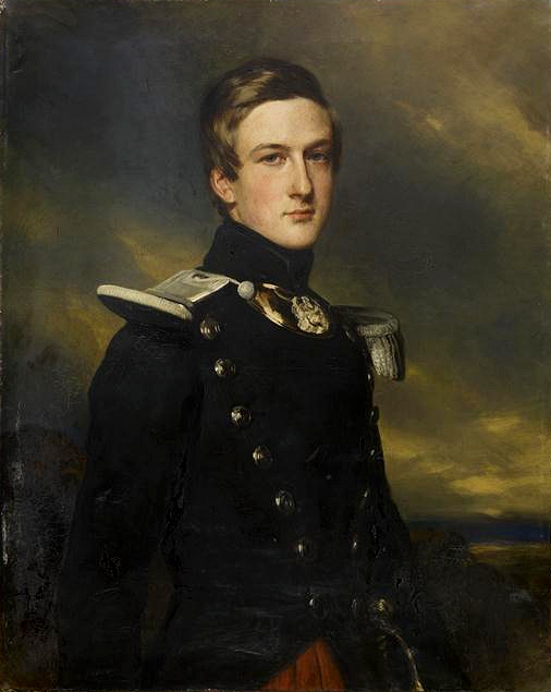 Le duc d'Aumale en chef de bataillon du XVIIème léger